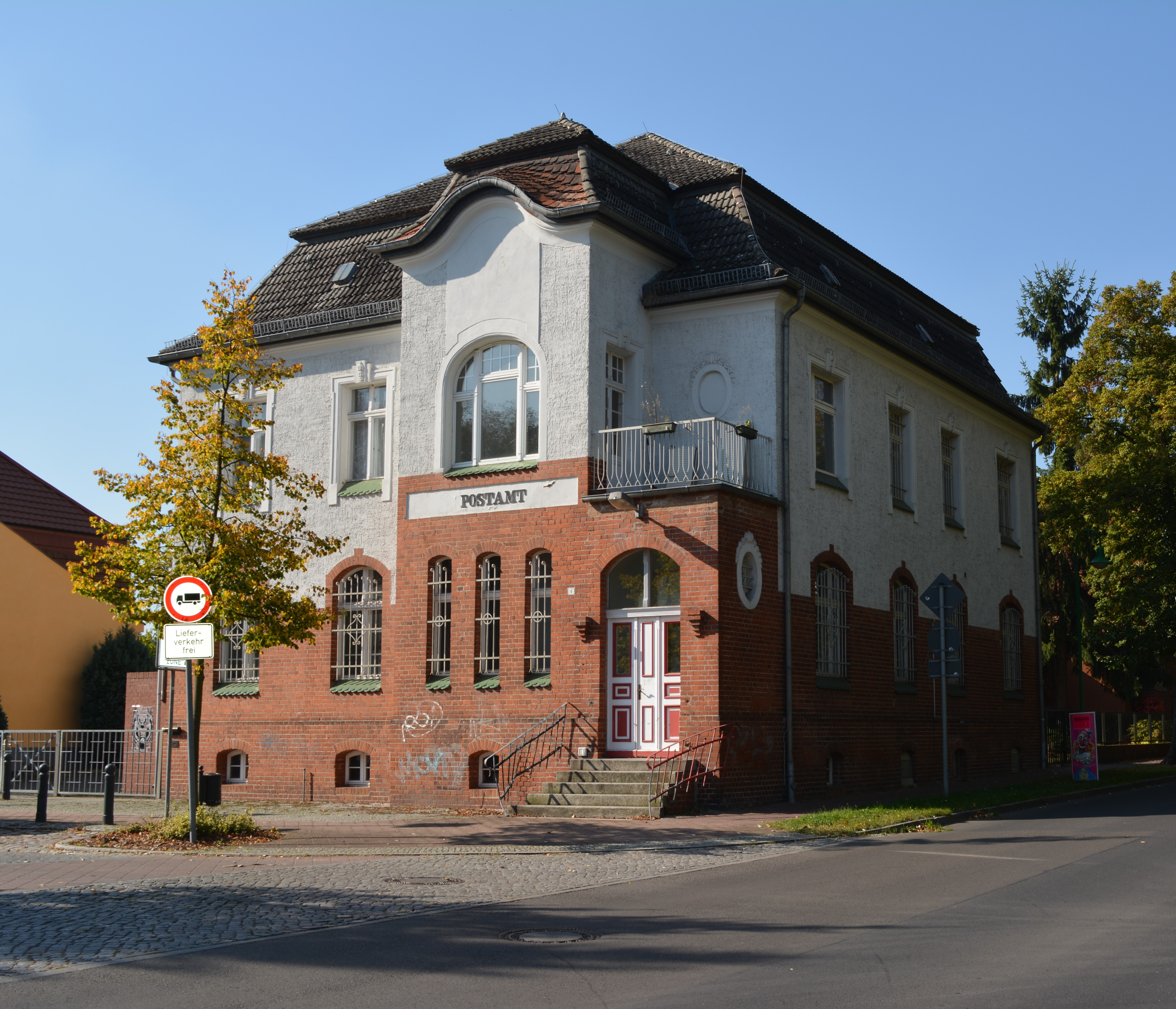 Postamt in der Straße Altstadt 1 / Ecke Poststraße in Werneuchen